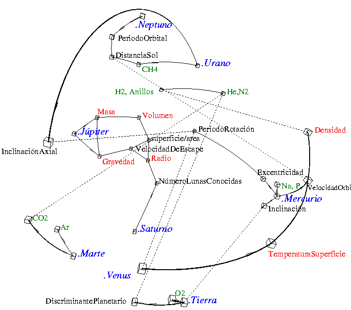 Vínculo entre las variables de las planetas.